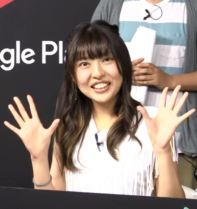 【GAMEFEST 2016夏＃45】声優三人でデレステチャレンジ！